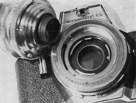 Système Voigtländer Bessamatic-Ultramatic, objectifs montés devant l'obturateur central (1968)